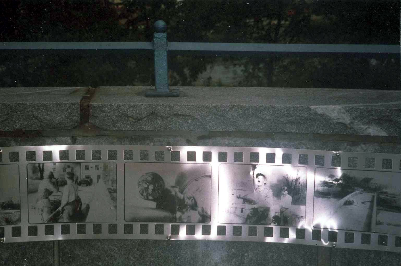 Szenenaufnahmen als Erinnerung an den Film am Brückengeländer